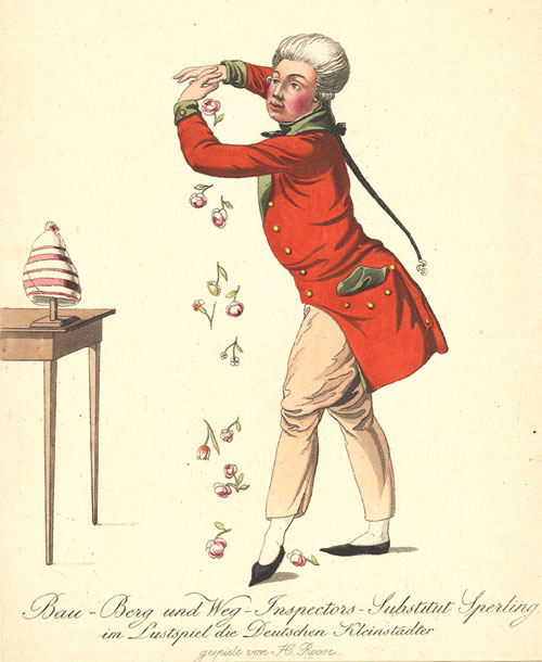 H. Roose als Sperling in Kotzebues Die deutschen Kleinstädter.C. 20,5 x 16,5 cm.